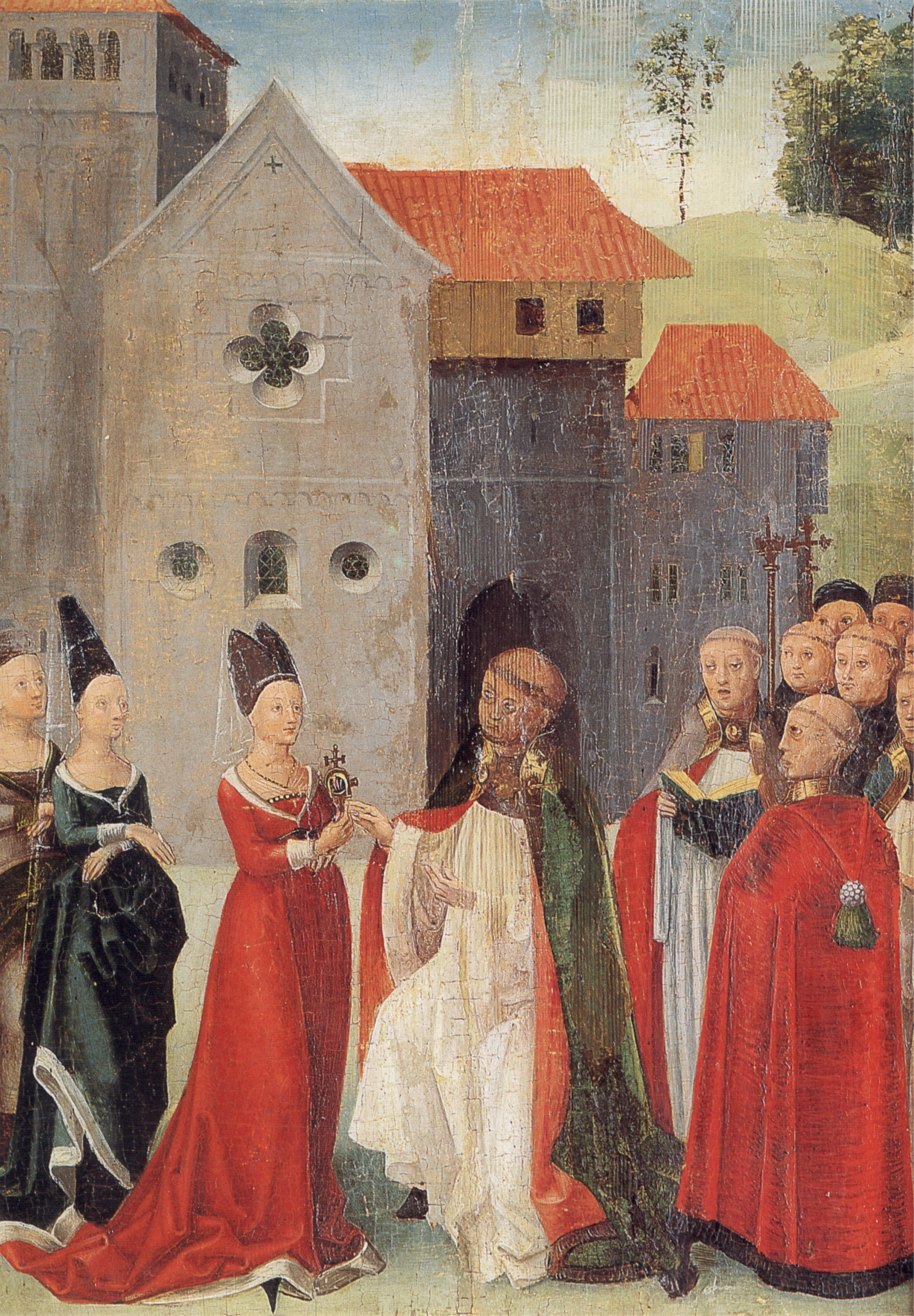 Weingartener Heilig-Blut-Tafel von 1489. Landesmuseum Württemberg, Stuttgart. Tafel 24: Judith übergibt dem Kloster Weingarten die Heilig-Blut-Reliquie (im Hintergrund die älteste Ansicht der mittelalterlichen Klosteranlage Weingarten)